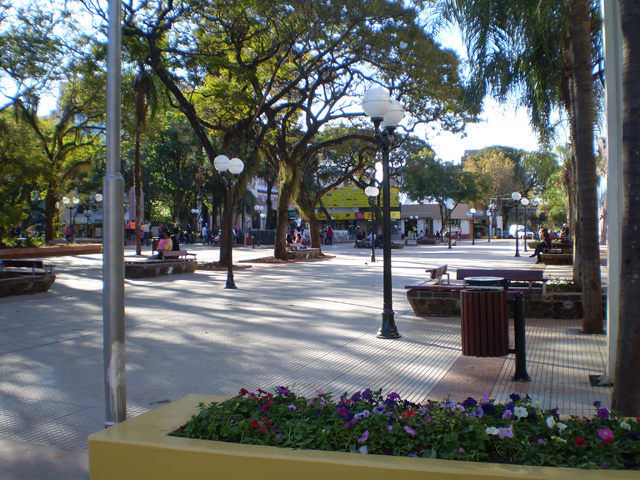 Plaza